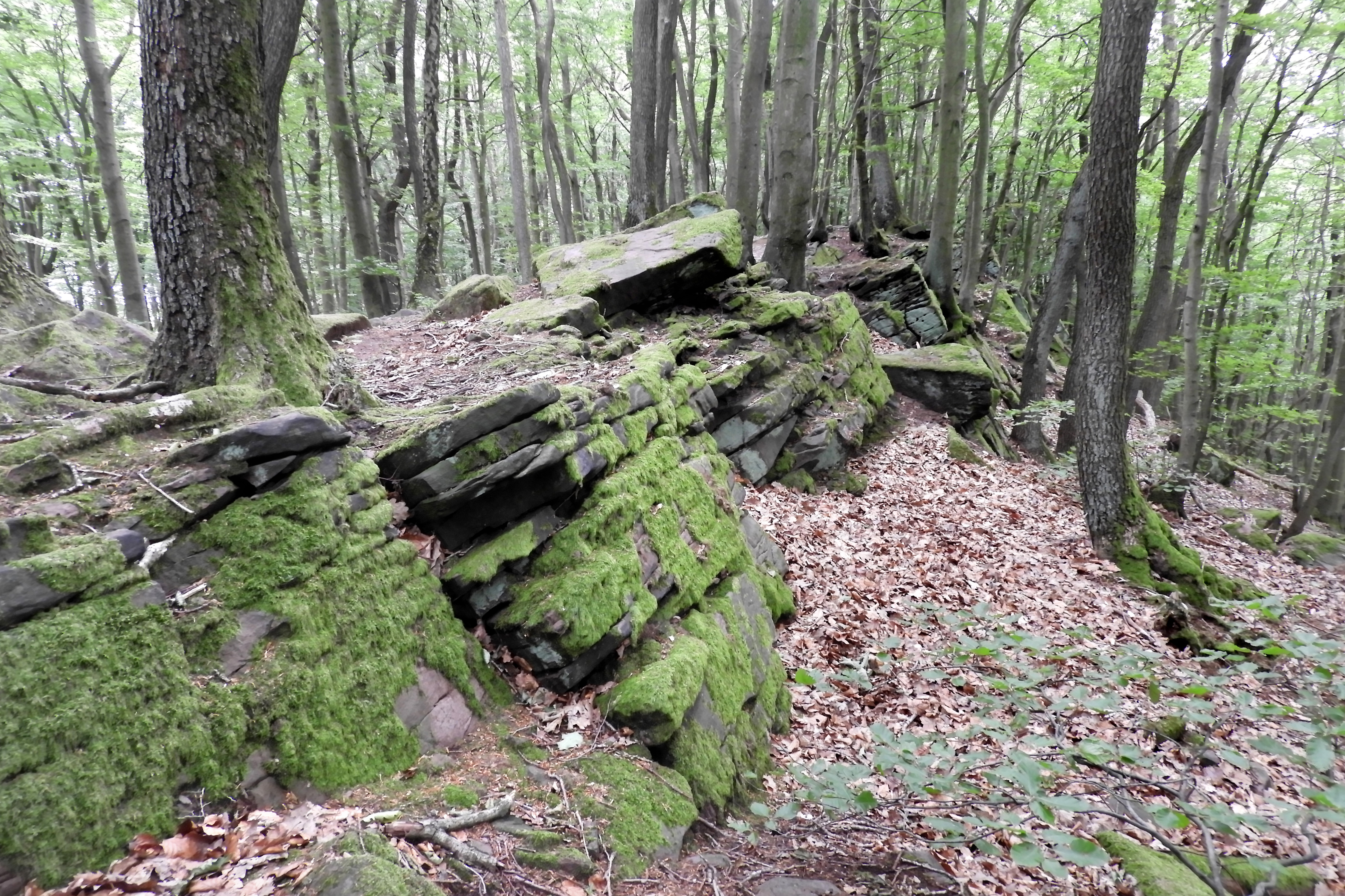 Das Naturschutzgebiet und Natura 2000-Gebiet liegt in den Gemarkungen der Gemeinden Lindewerra und Bornhagen der Verwaltungsgemeinschaft Hanstein-Rusteberg im thüringischen Landkreis Eichsfeld. Es befindet sich innerhalb des Bundsandsteingebiets des Höhebergs. Das Naturschutzgebiet hat die thüringeninterne Kennung 194 und den WDPA-Code 164048. Als FFH-Gebiet hat es in Thüringen die Nummer 16, die europäische Gebietsnummer 4625-303 und den WDPA-Code 555519946. Es liegt vollständig im EU-Vogelschutzgebiet „Werrabergland südwestlich Uder“ mit der Gebietsnummer 4626-420, der thüringeninternen Nummer 12 und dem WDPA-Code 555537539.